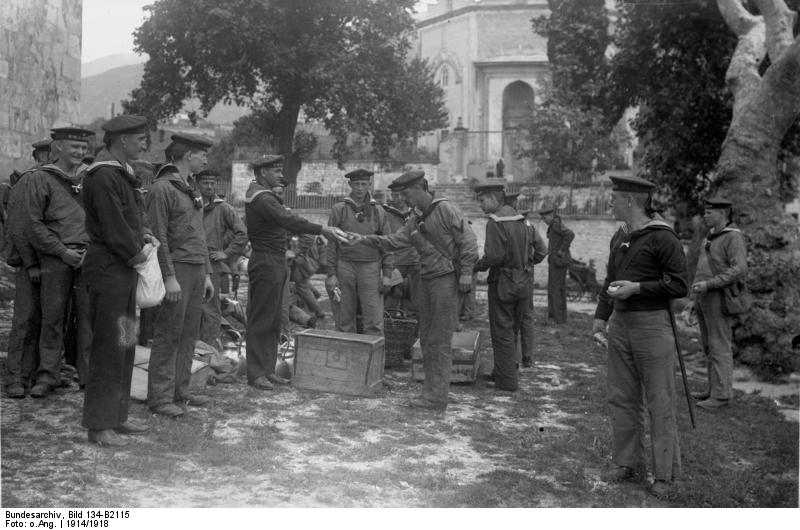 Türkei, Besatzung des Kreuzers Breslau Breslau, Stapell.: 16.5.1911 Kleiner Kreuzer Besatzung in der Türkei an Land [Kreuzer Breslau unter türkischer Flagge "Midillih", Ausgabe von Verpflegung]